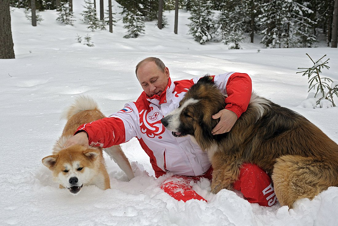 Во время прогулки в Подмосковье. С Баффи, болгарской овчаркой, и Юмэ, собакой породы акита-ину.